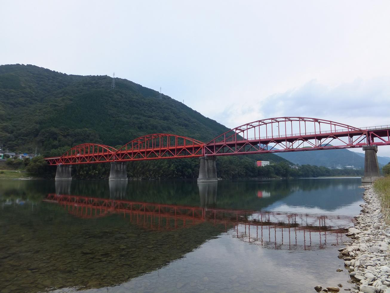 国道438号美馬橋（徳島県美馬市美馬町- 美馬郡つるぎ町） 左岸下流側より撮影